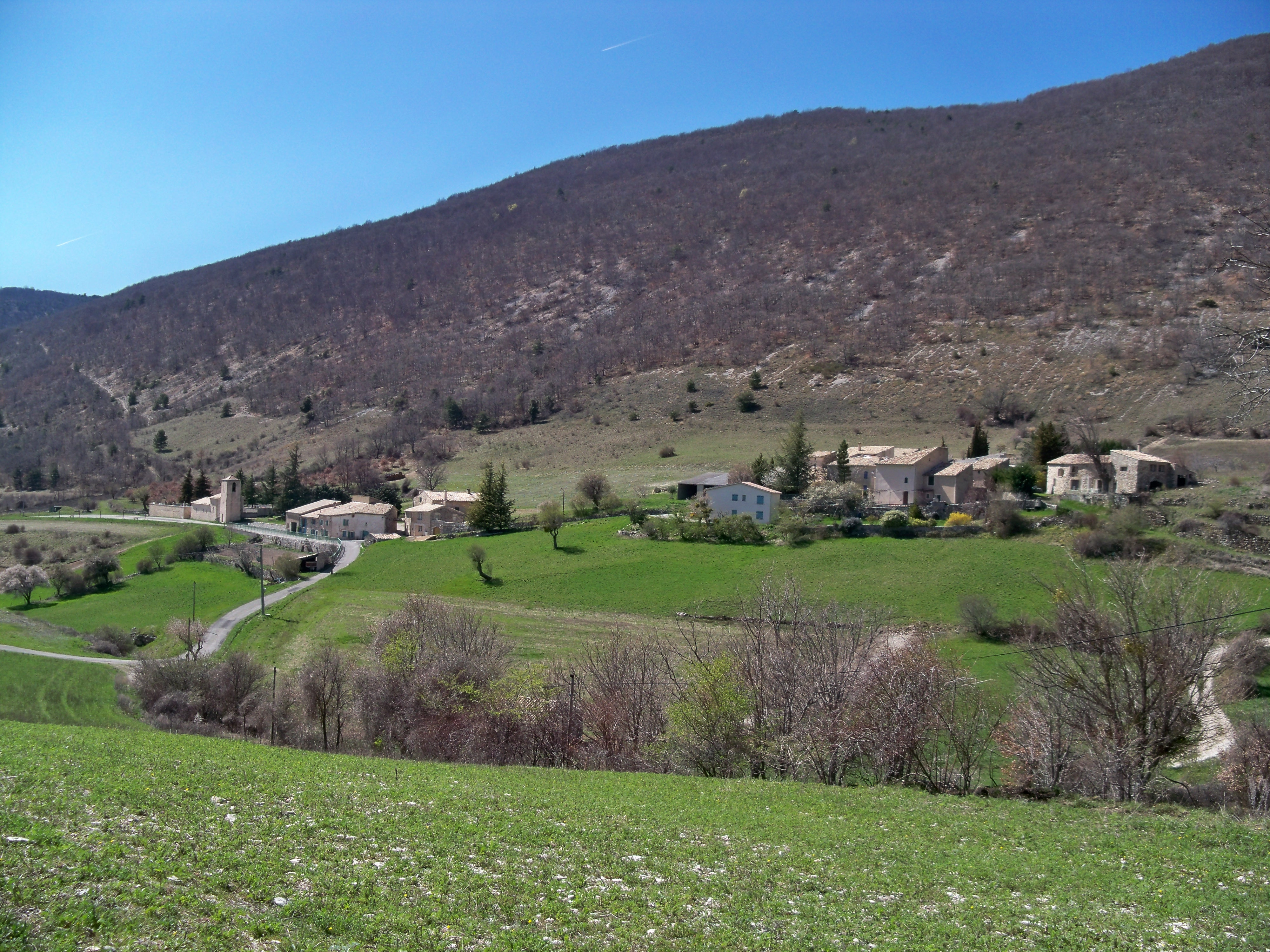 Hameau de jonquet, commune de la Rochegiron (04)